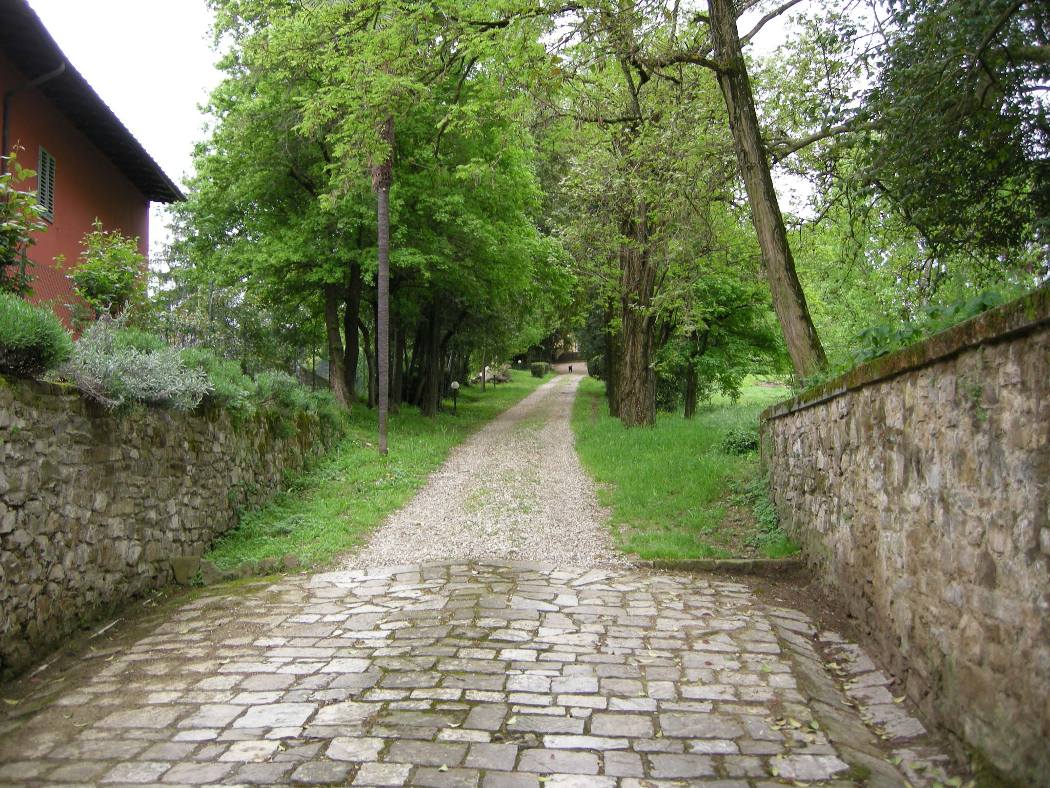 Villa savonarola, ingresso